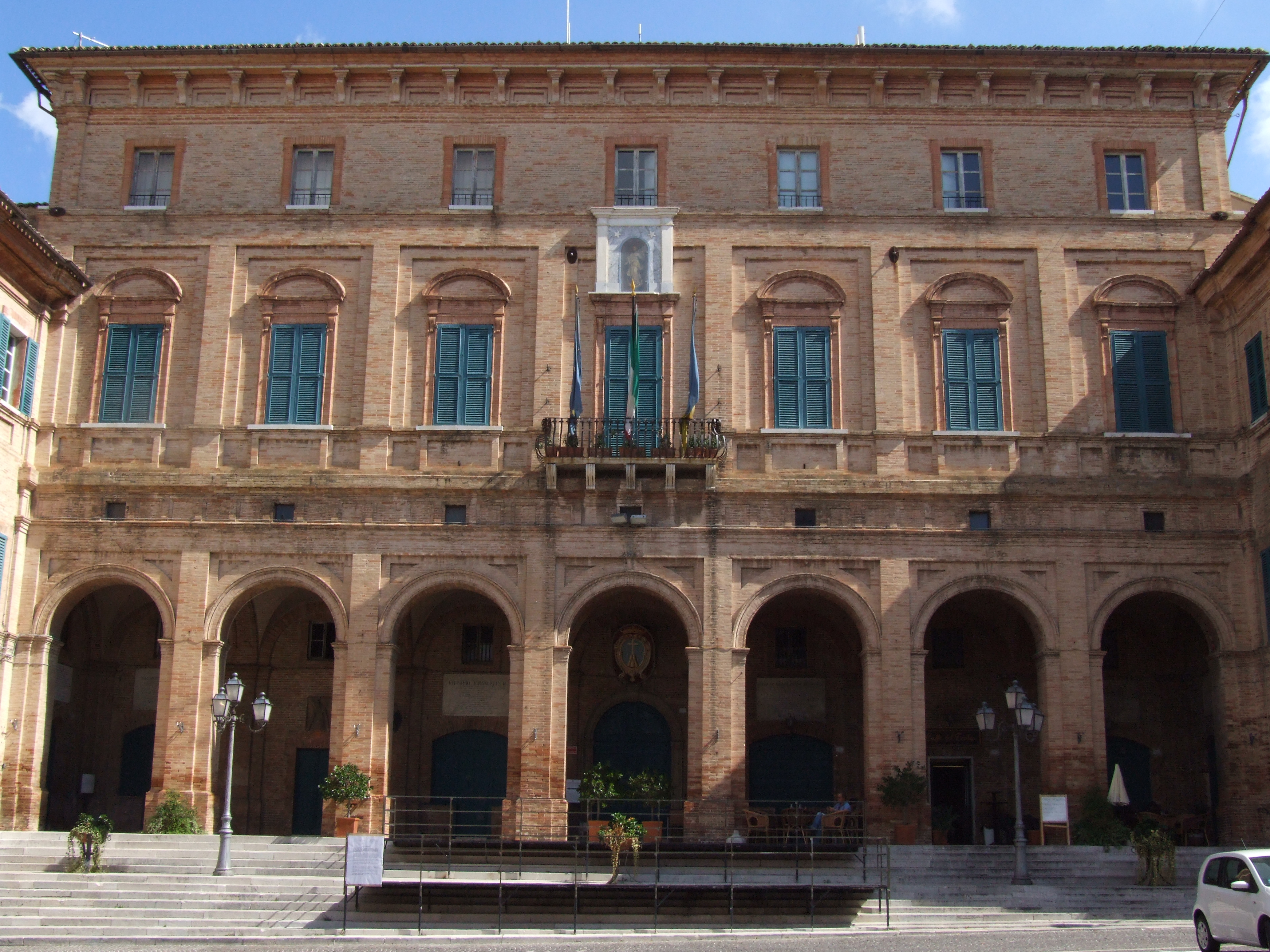 Palazzo Comunale This is a photo of a monument which is part of cultural heritage of Italy.